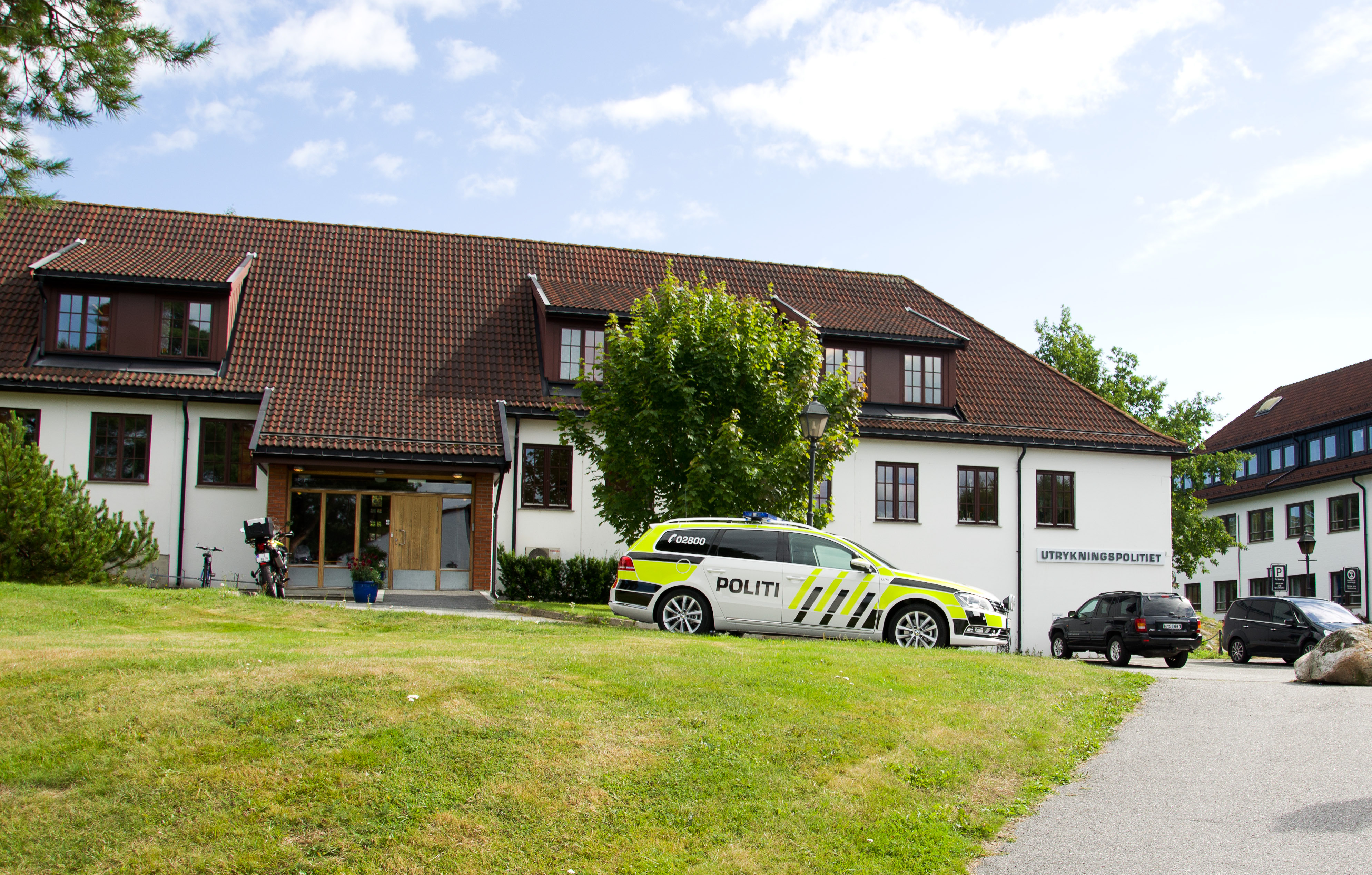 Utrykningspolitiets hovedkontor i Stavern